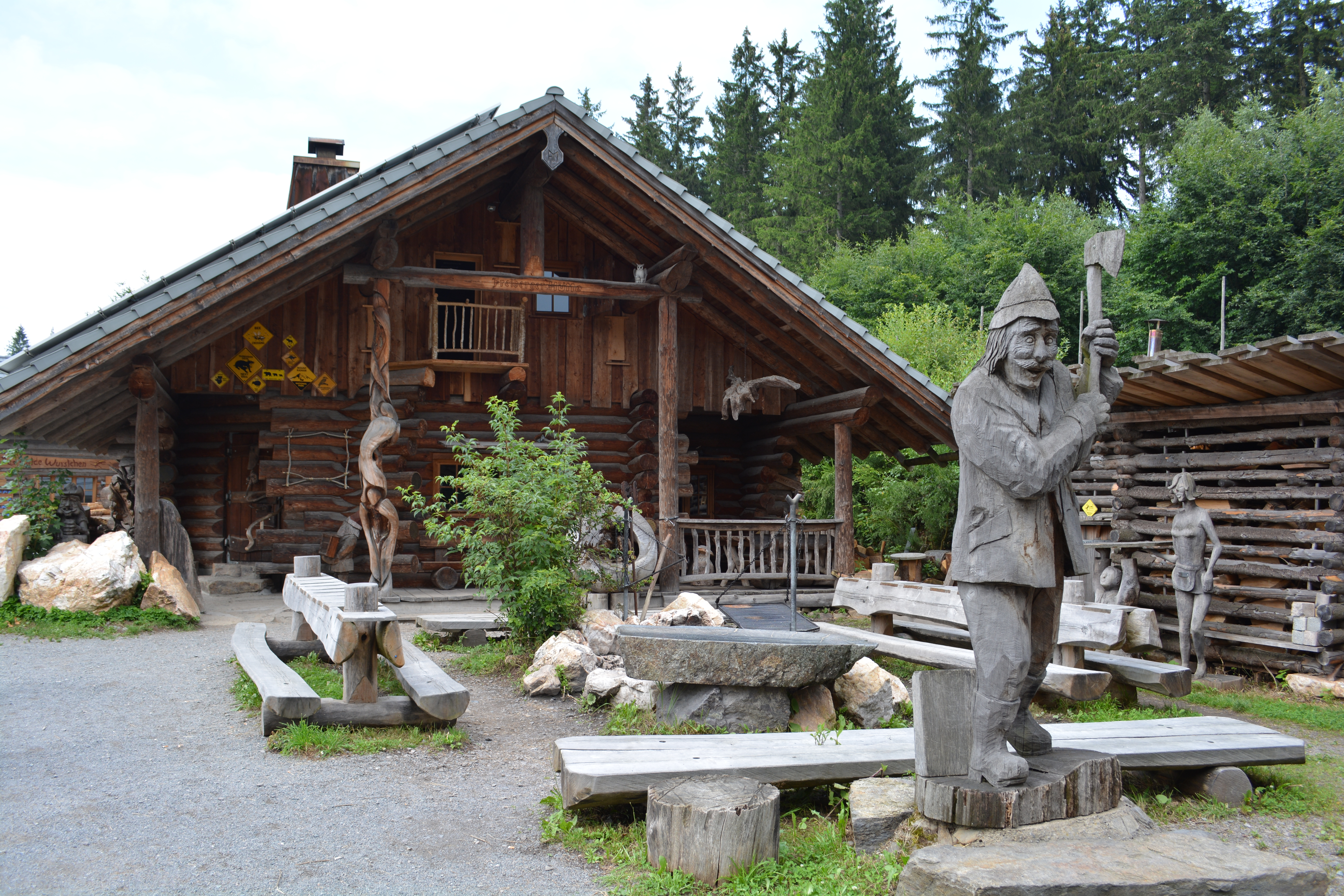 Blockhausen: Kettensägen-Schnitzen, Freiberger Hütte